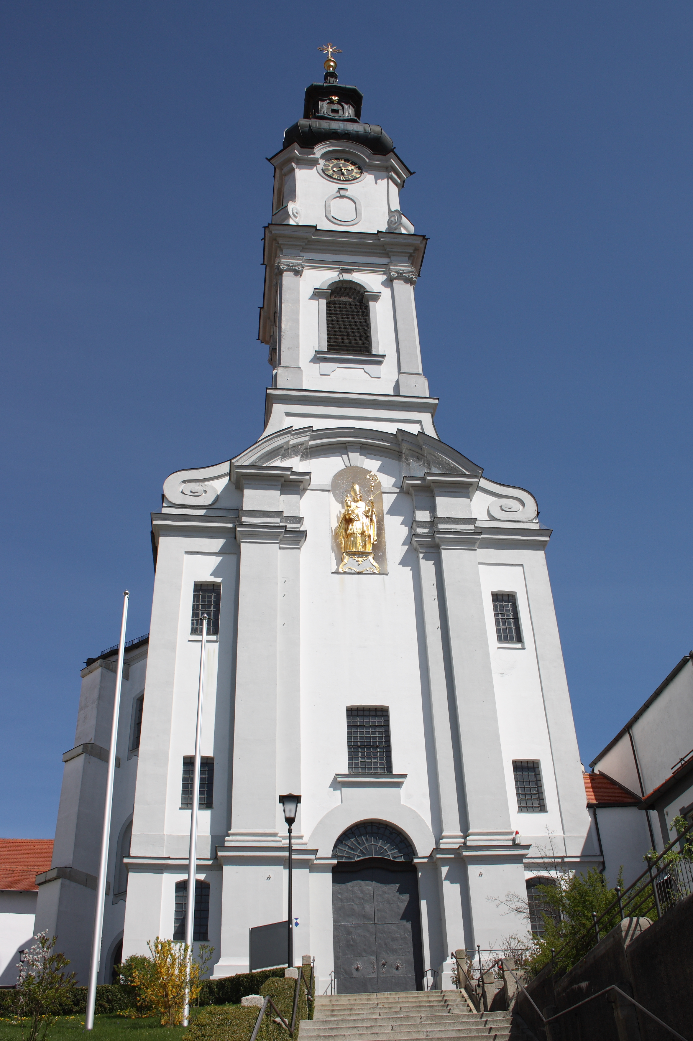 Katholische Pfarr- und Klosterkirche St. Alto und St. Birgitta in Altomünster im Landkreis Dachau (Bayern), Westfassade